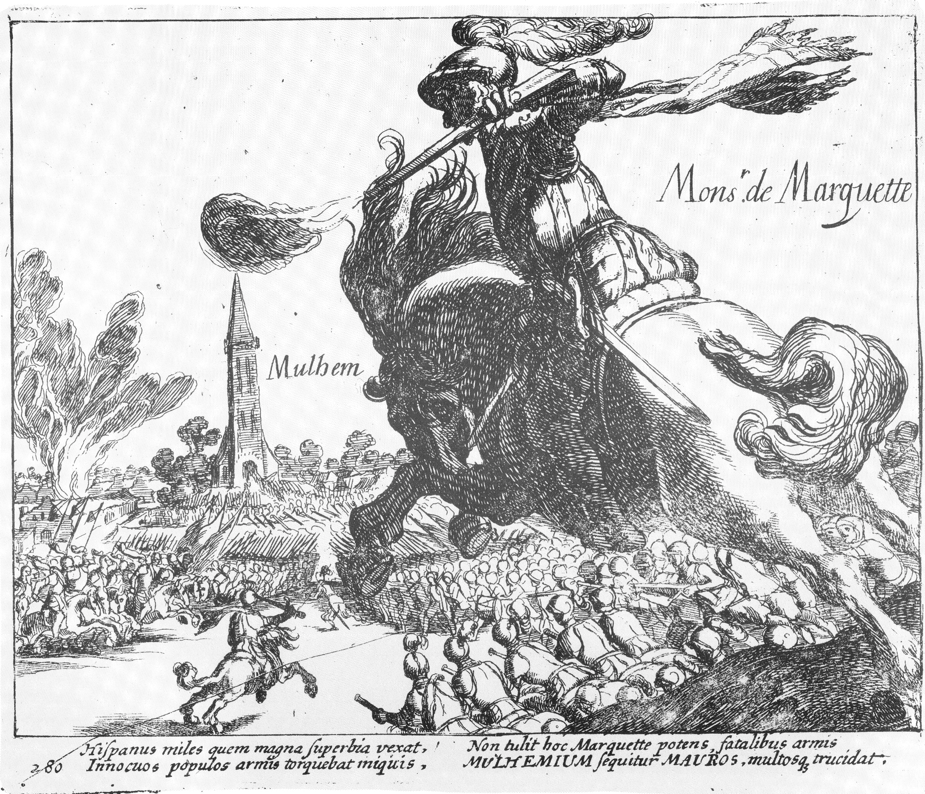 Die Schlacht von Mülheim im Jahr 1609